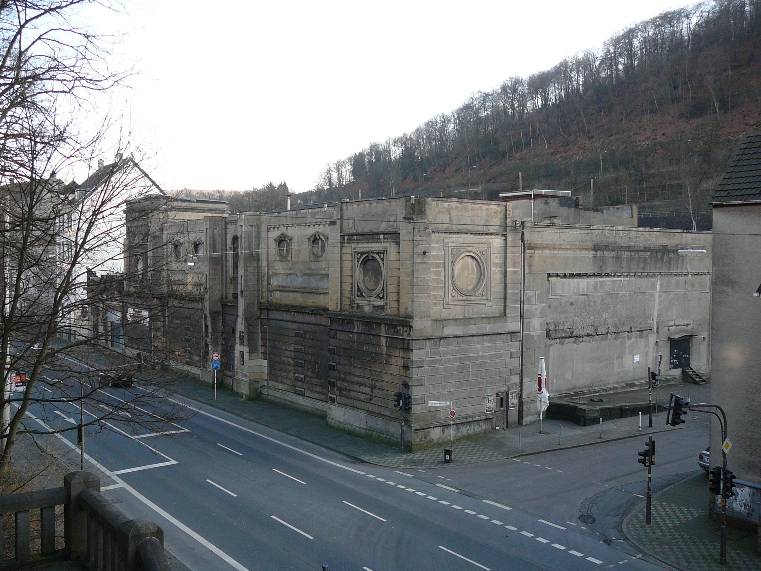 Friedrich-Ebert-Str., Wuppertal